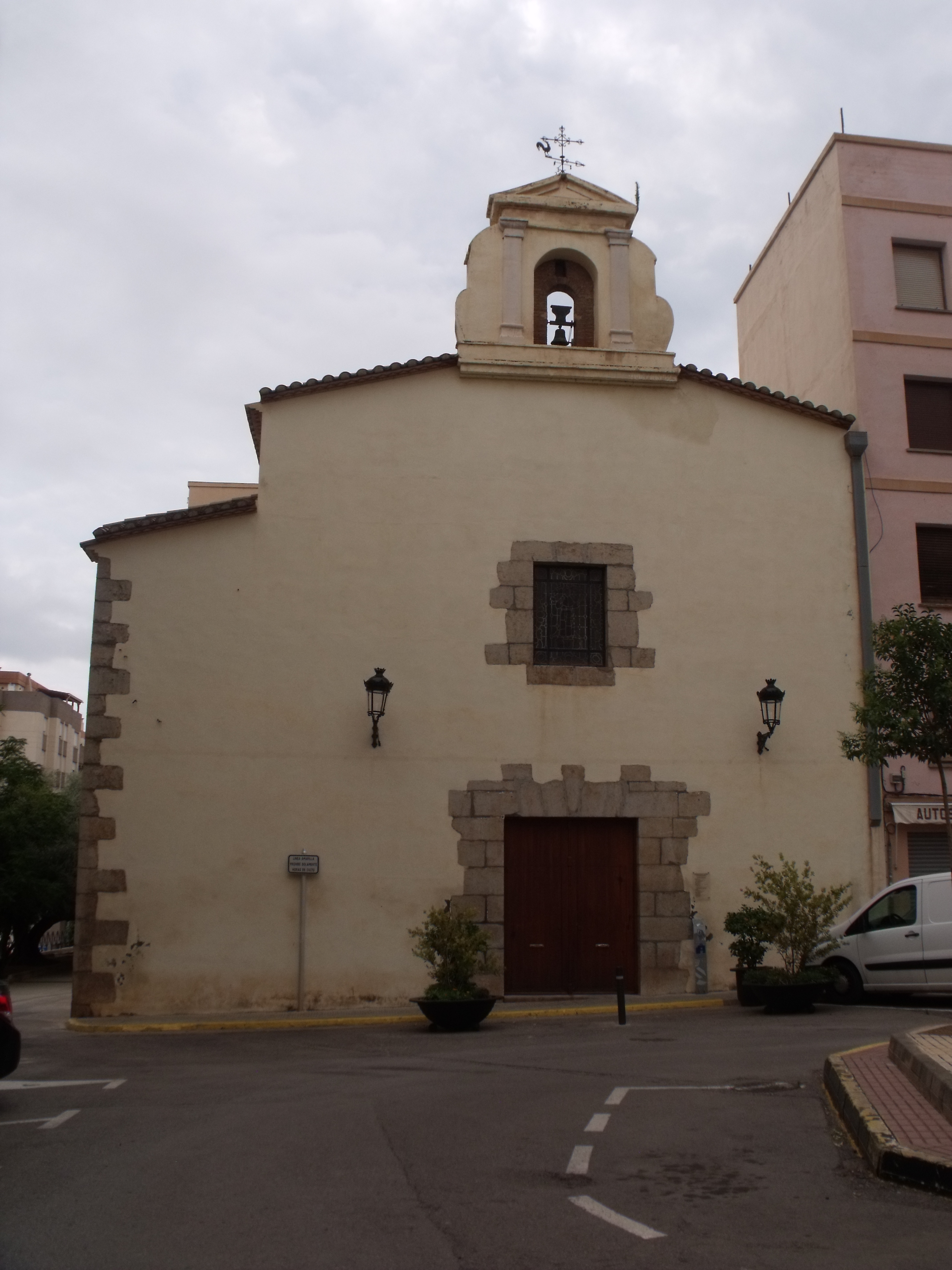 iglesia de San Francisco